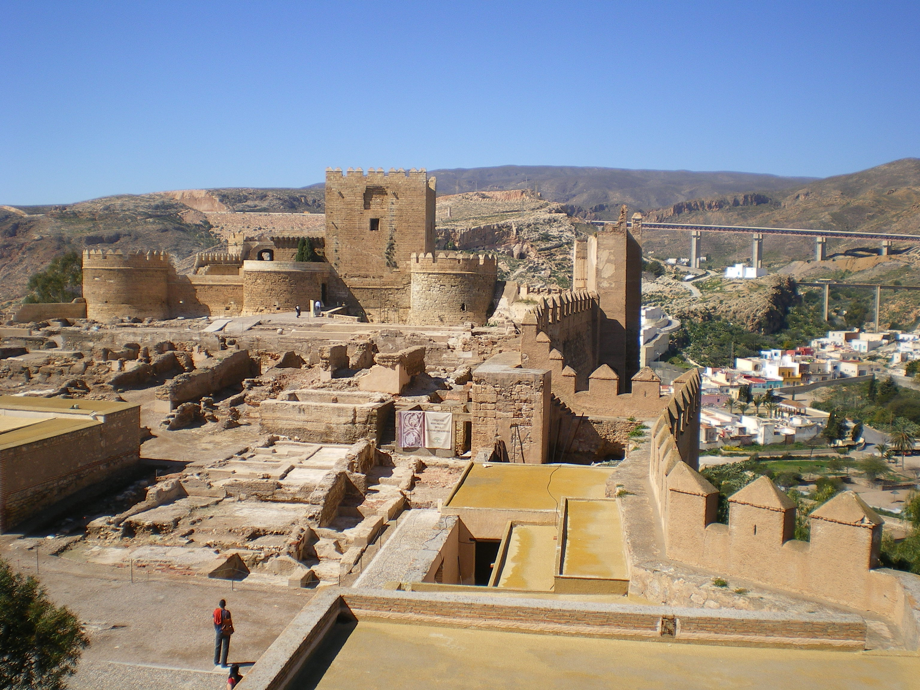 Vista de las ruinas de la zona administrativa y del Palacio del Rey Almotacín en el segundo recinto de la Alcazaba de Almería, España, desde el este. Al fondo la fortaleza de los Reyes Católicos. A la derecha en la muralla, la ventana de la Odalisca